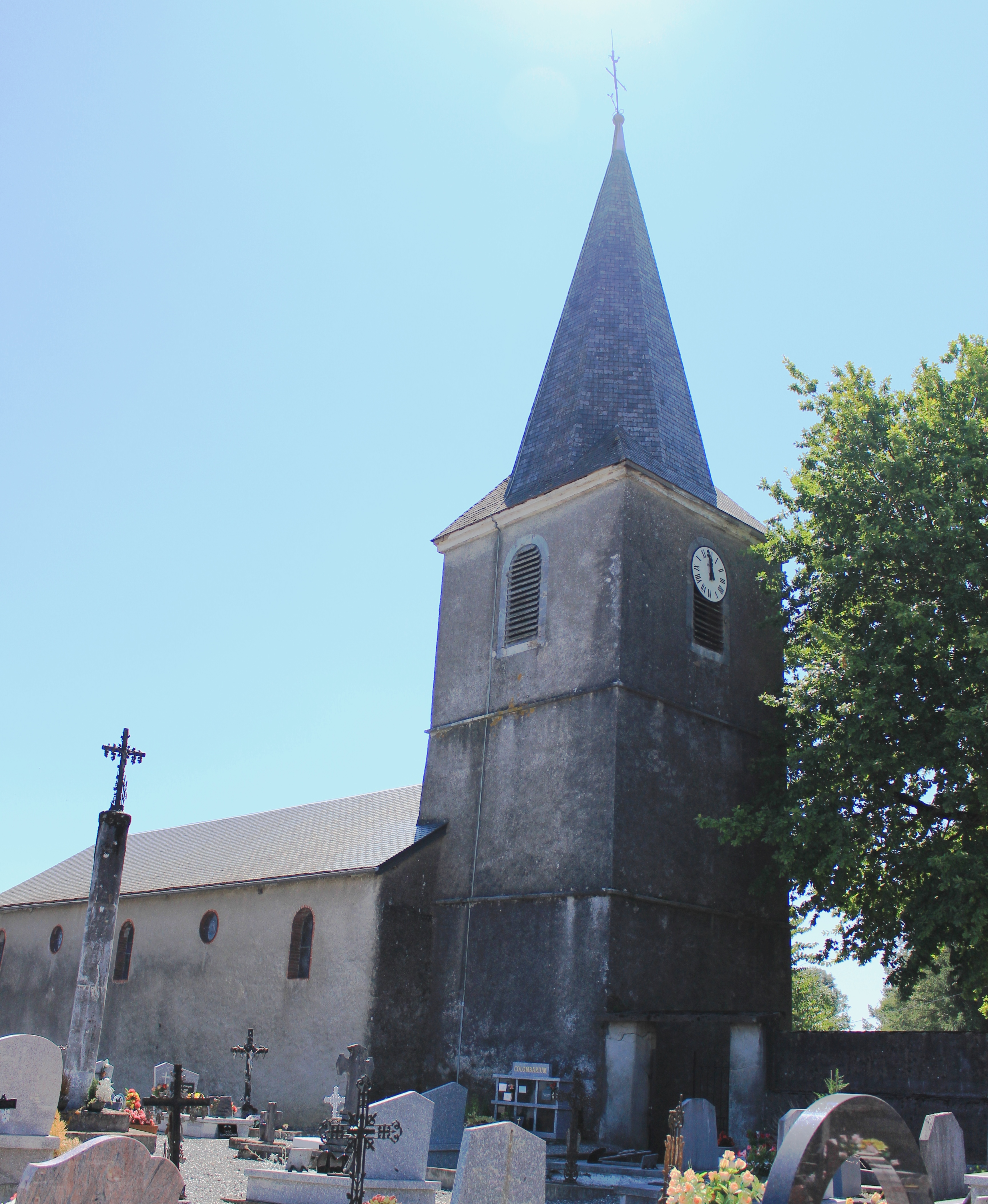 Église de la Nativité-de-la-Sainte-Vierge de Lutilhous (Hautes-Pyrénées)